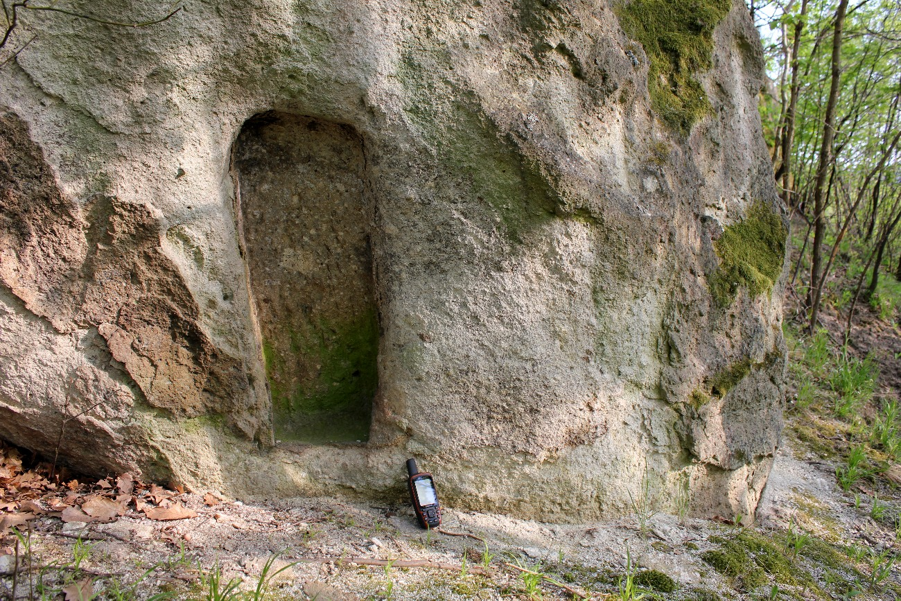 H2a, Eger, Cakó-tető, 4. szikla, 1. fülke